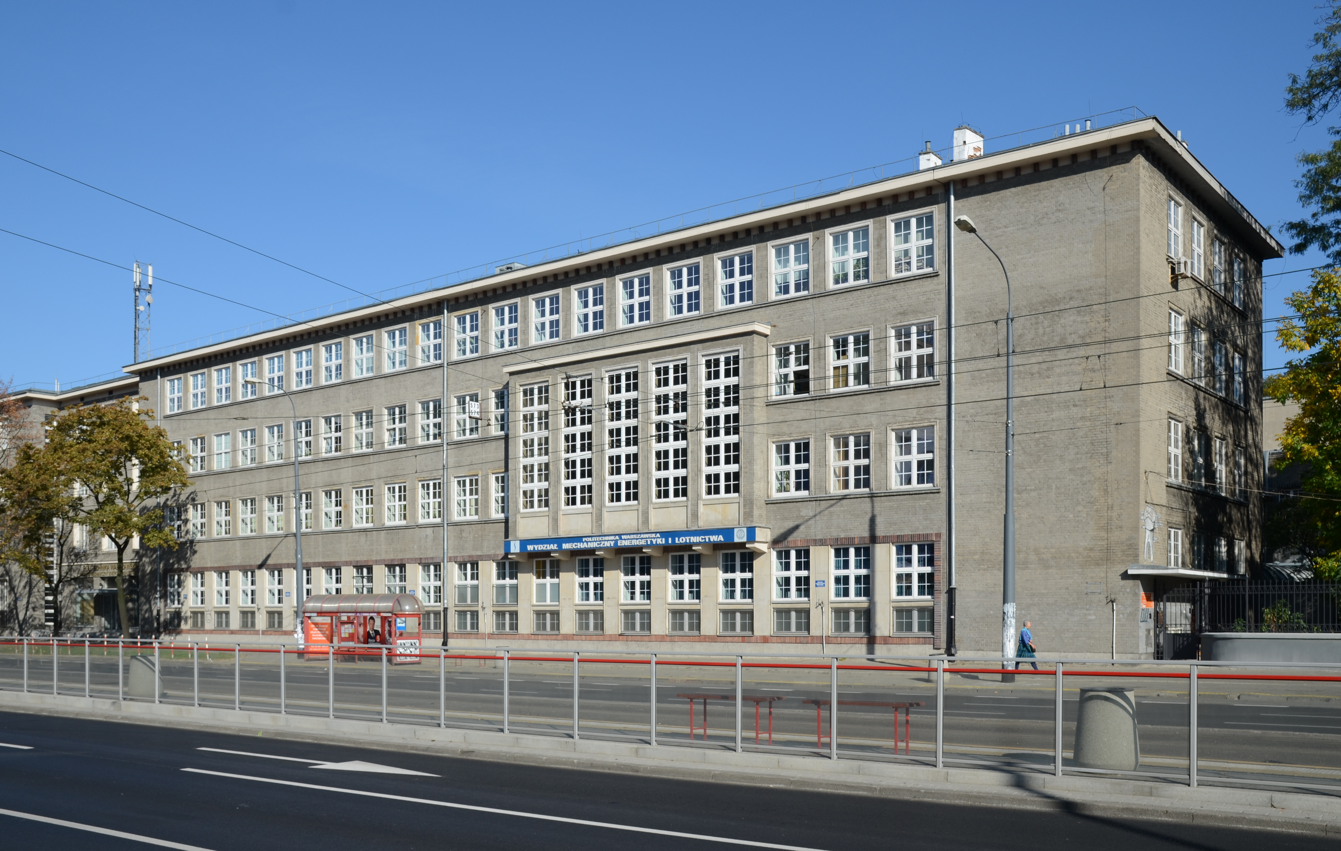 Wydział Mechaniczny Energetyki i Lotnictwa Politechniki Warszawskiej przy al. Niepodległości